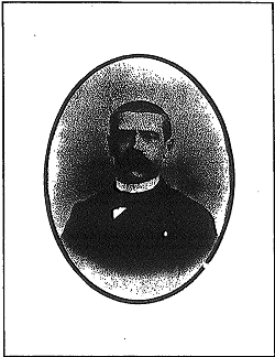 Photographie de M. Joseph PARIS